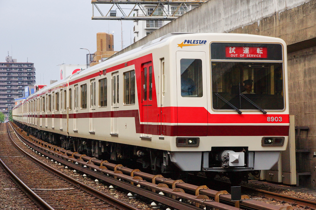 北大阪急行8000形の一部改造車です